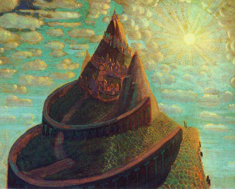 Castle.Fairy-Tale by Mikalojus Konstantinas Čiurlionis